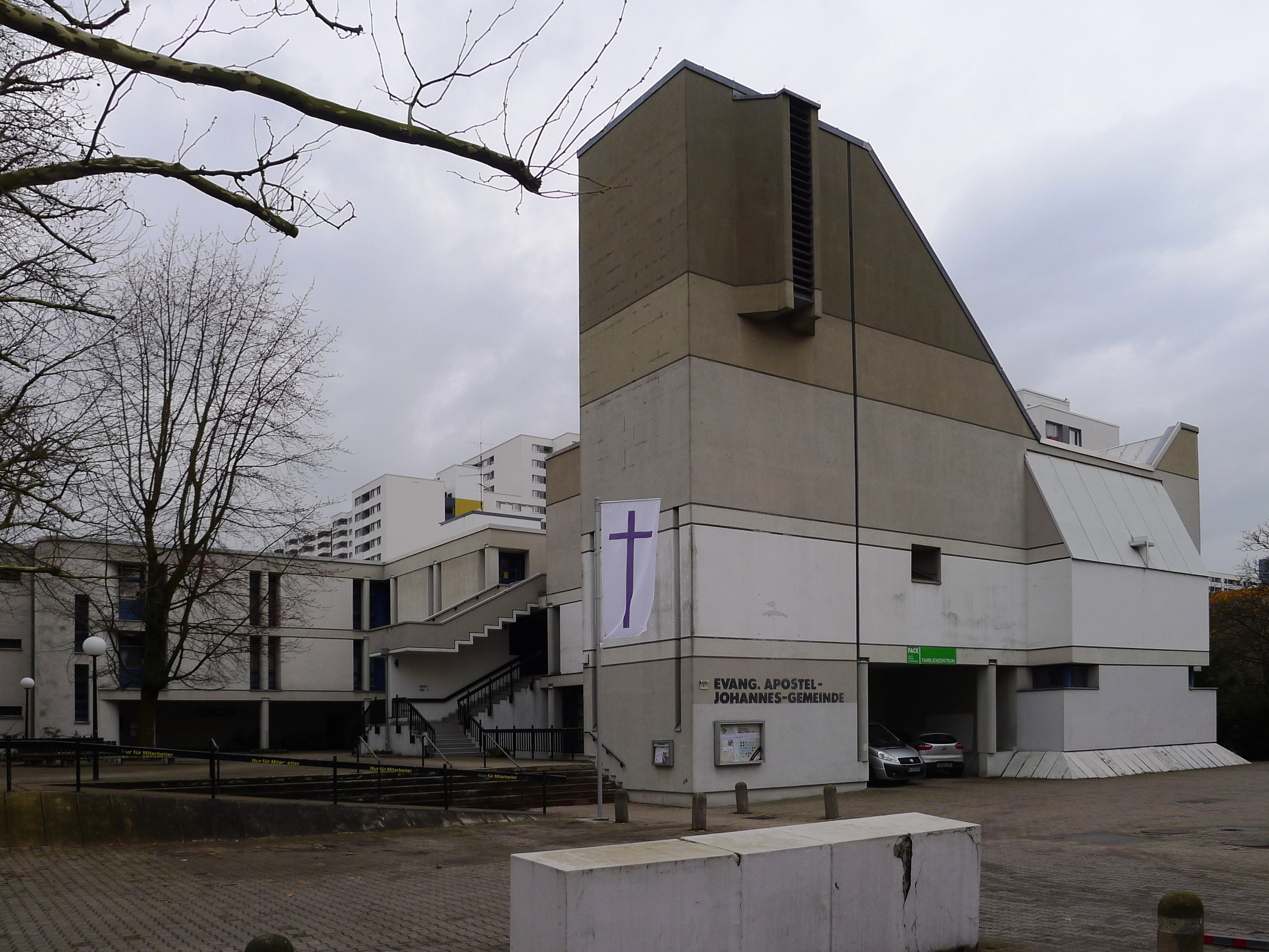 Blick auf den Glockenturm